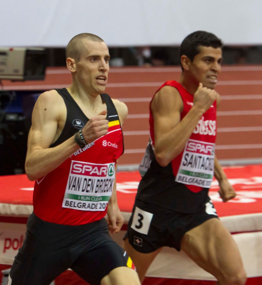 _103 800m series vandenbroeck